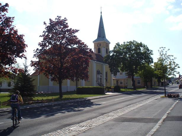 Kostol v Bergu